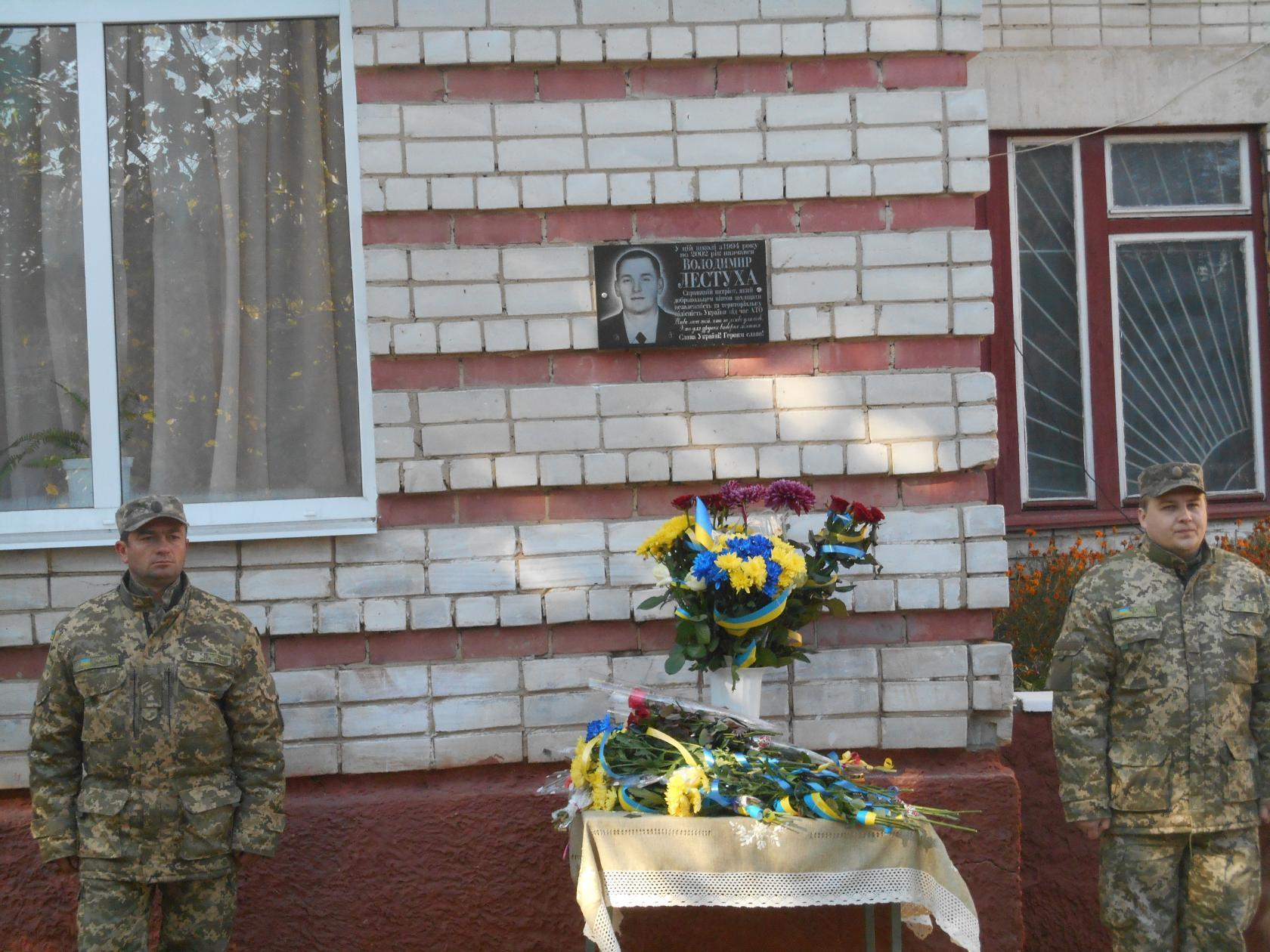 меморіальна дошка